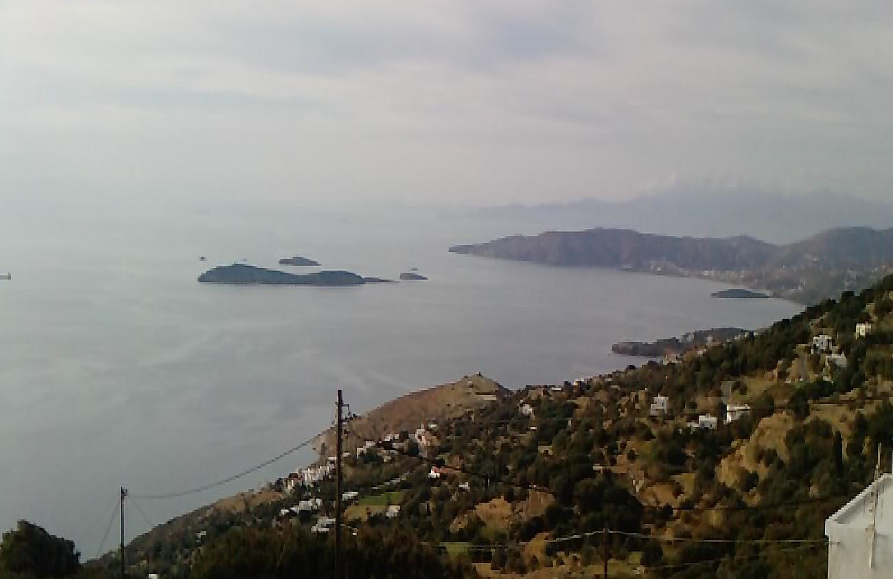 Γαυριονήσια